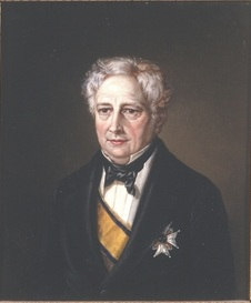 Palle Rømer Fleischer Eier: Eidsvoll 1814